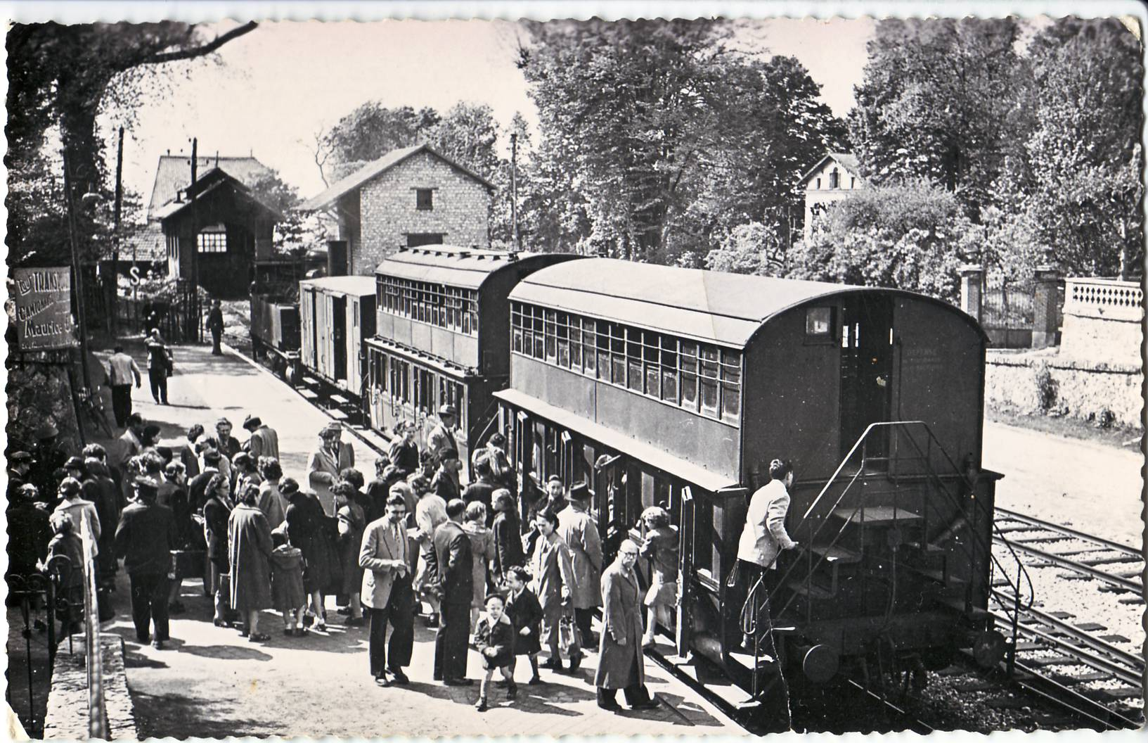 Carte postale semi moderne du train Le refoulons à Montmorency